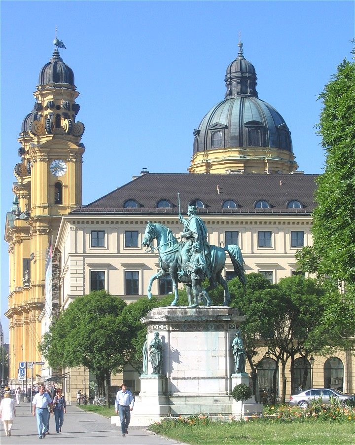 Reiterstandbild Ludwig I, Theatinerkirche, Odeonsplatz in München